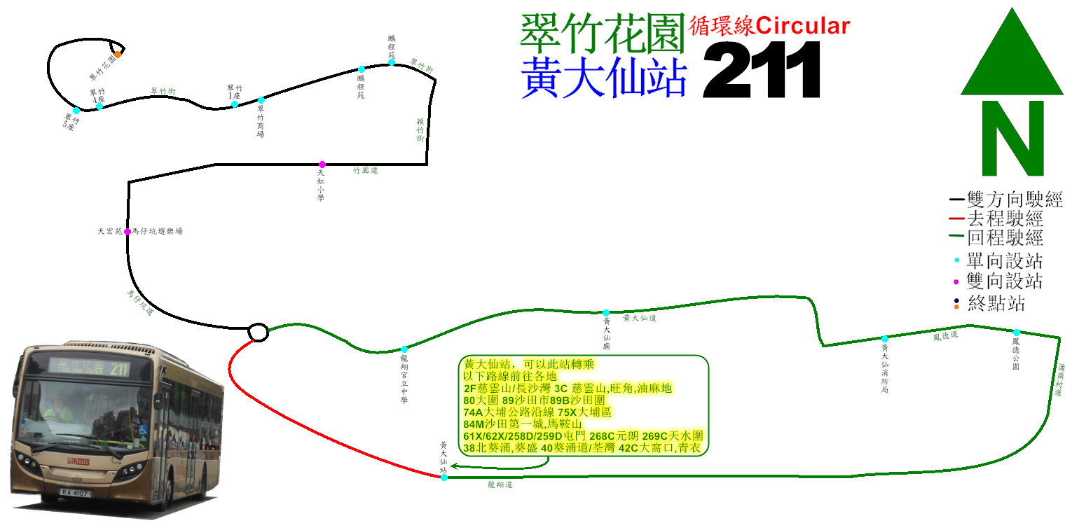 中文（香港）: 九巴211線的走線圖